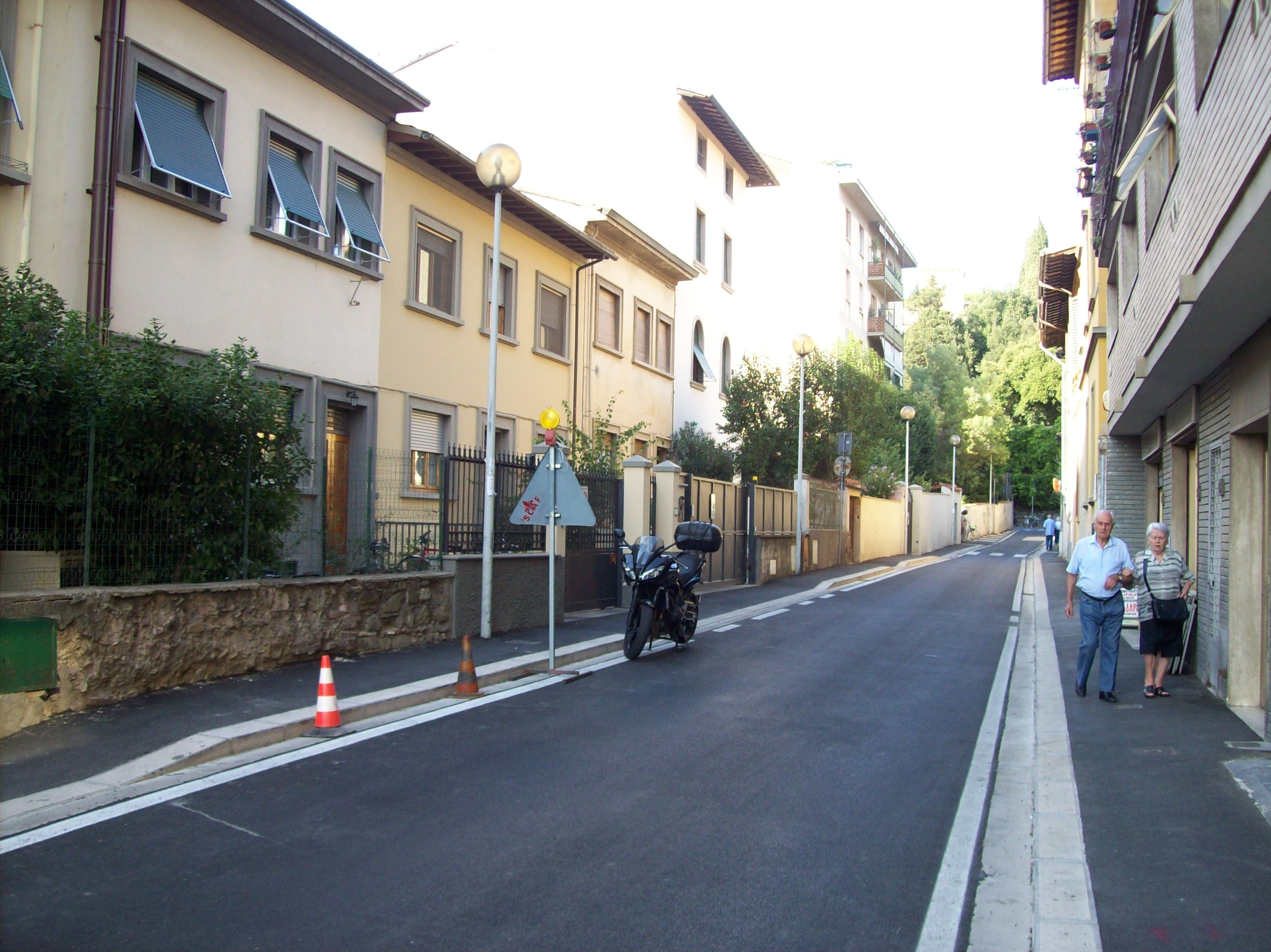 via luigi lanzi dopo il restauro